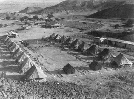 מחנה הגדנ"ע בבאר אורה, 1951